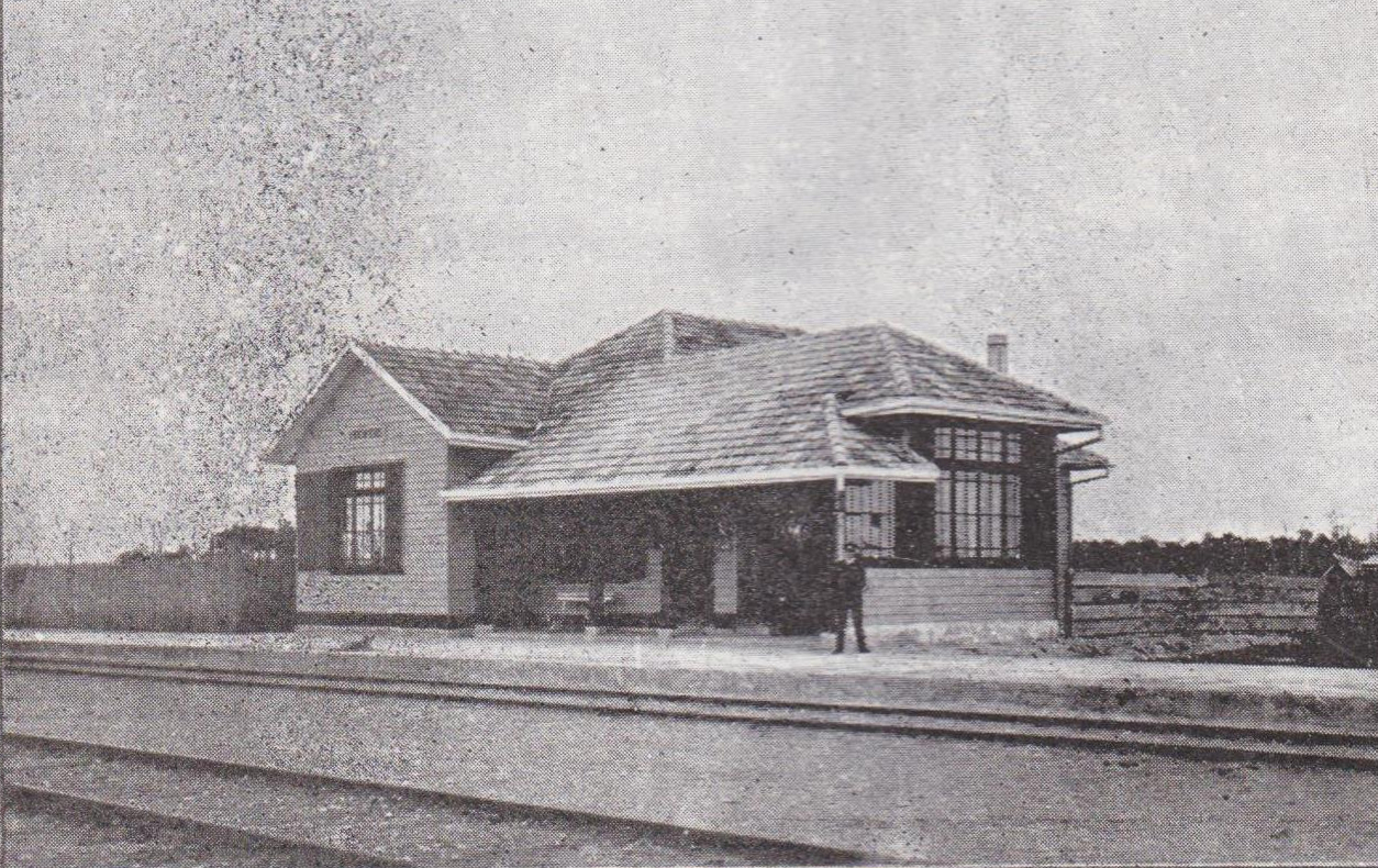 Estaciones del sur, estación de Alerce. Circa 1929. Imagen obtenida a partir del libro (in Spanish) (1929) Ferrocarriles del Estado de Chile (3rd ed.), Santiago: Impr. Harris y Pascual